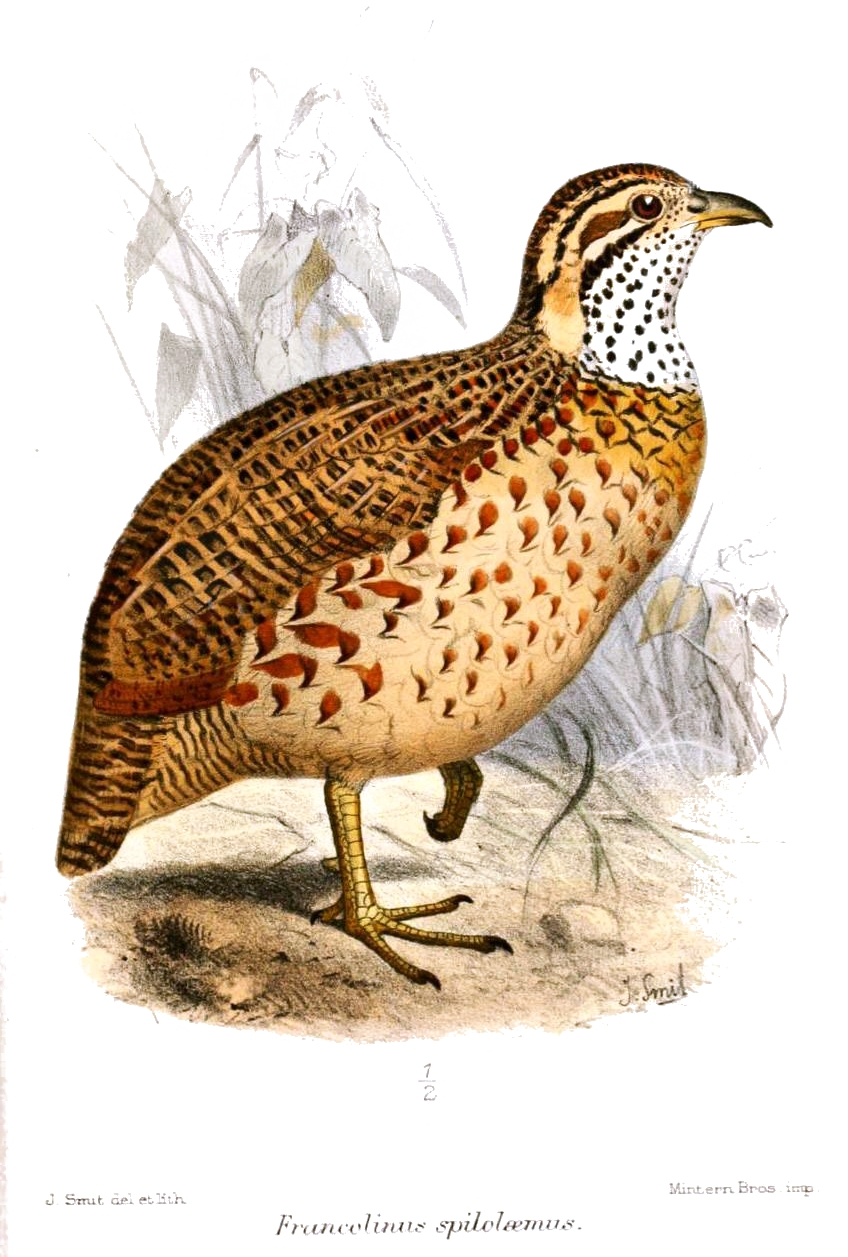 Francolinus spilolaemus = Scleroptila psilolaema Moorland Francolin